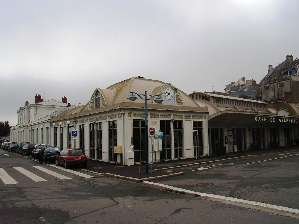 Gare de Granville (Manche, Basse-Normandie, France).